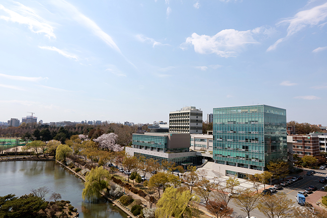 전남대학교 봄 풍경 사진